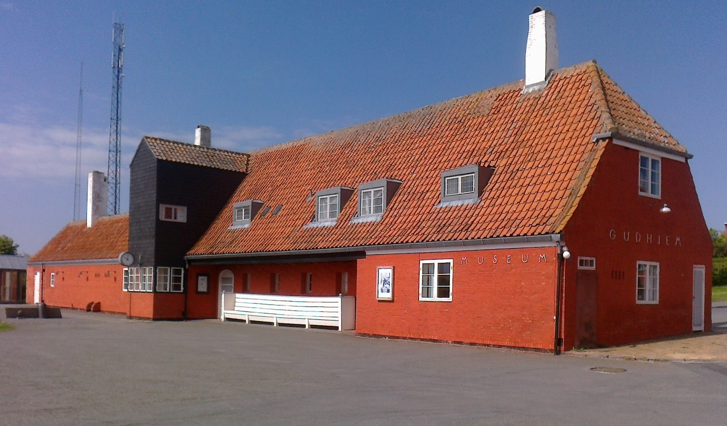 Gudhjem Station, sporside